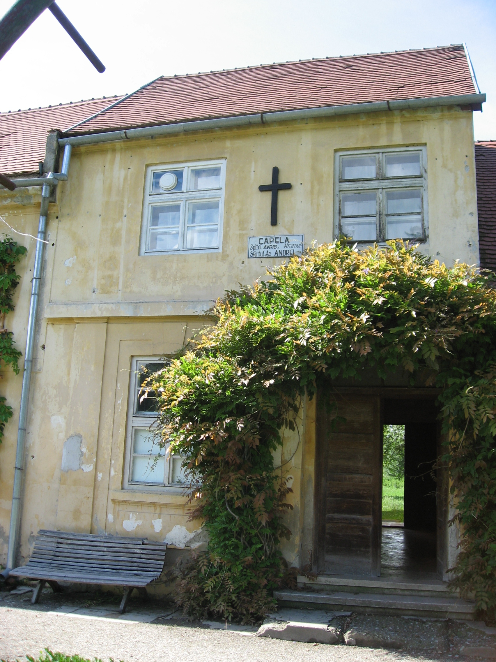 Brukenthal'sche Sommerresidenz in Freck / Avrig, Kapelle in einem Teil der Orangerie 01